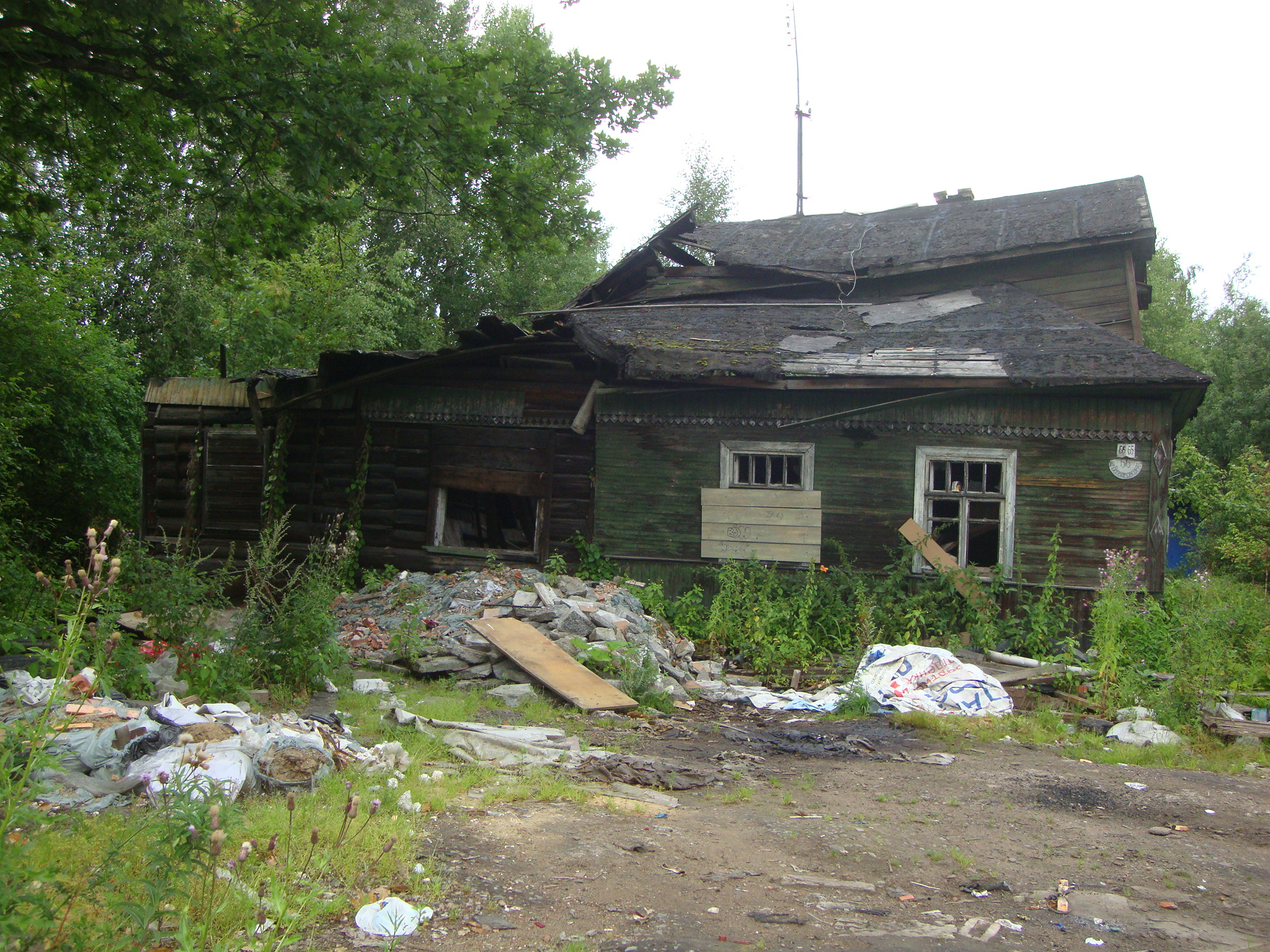 Санкт-Петербург, ул. Водопроводная, 66 - последний жилой дом улицы (на 2017 уже нежилой).